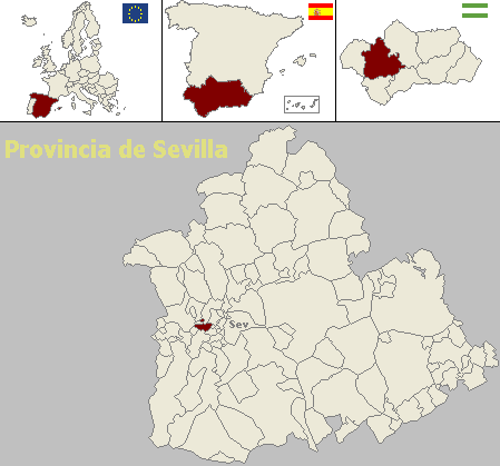 Mapa de localización del municipio sevillano de Espartinas (Andalucía, España)